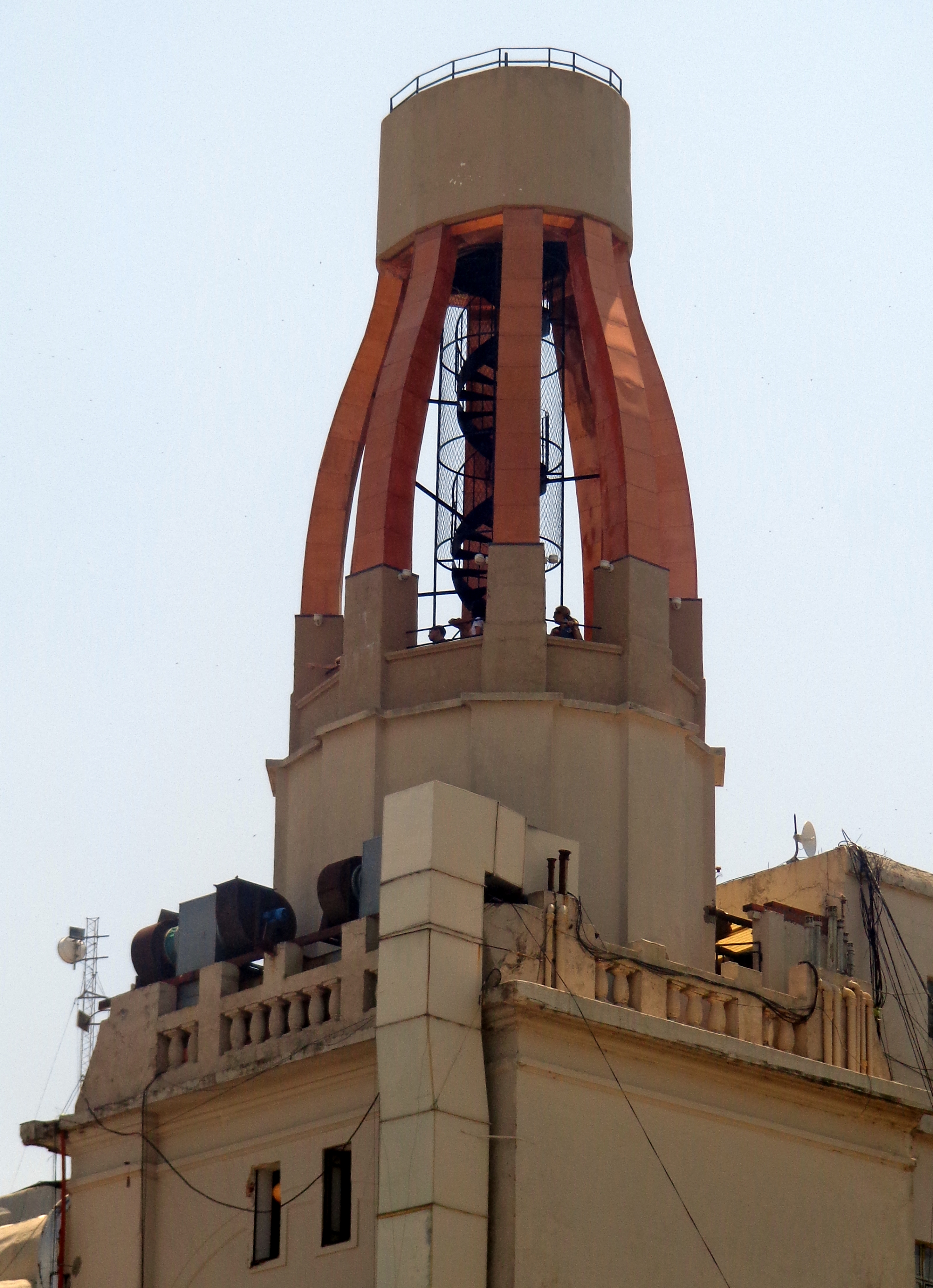 Torreta, cuya cúpula está hecha en acero y revestida en cobre, de la Galería Güemes, Buenos Aires, Argentina.